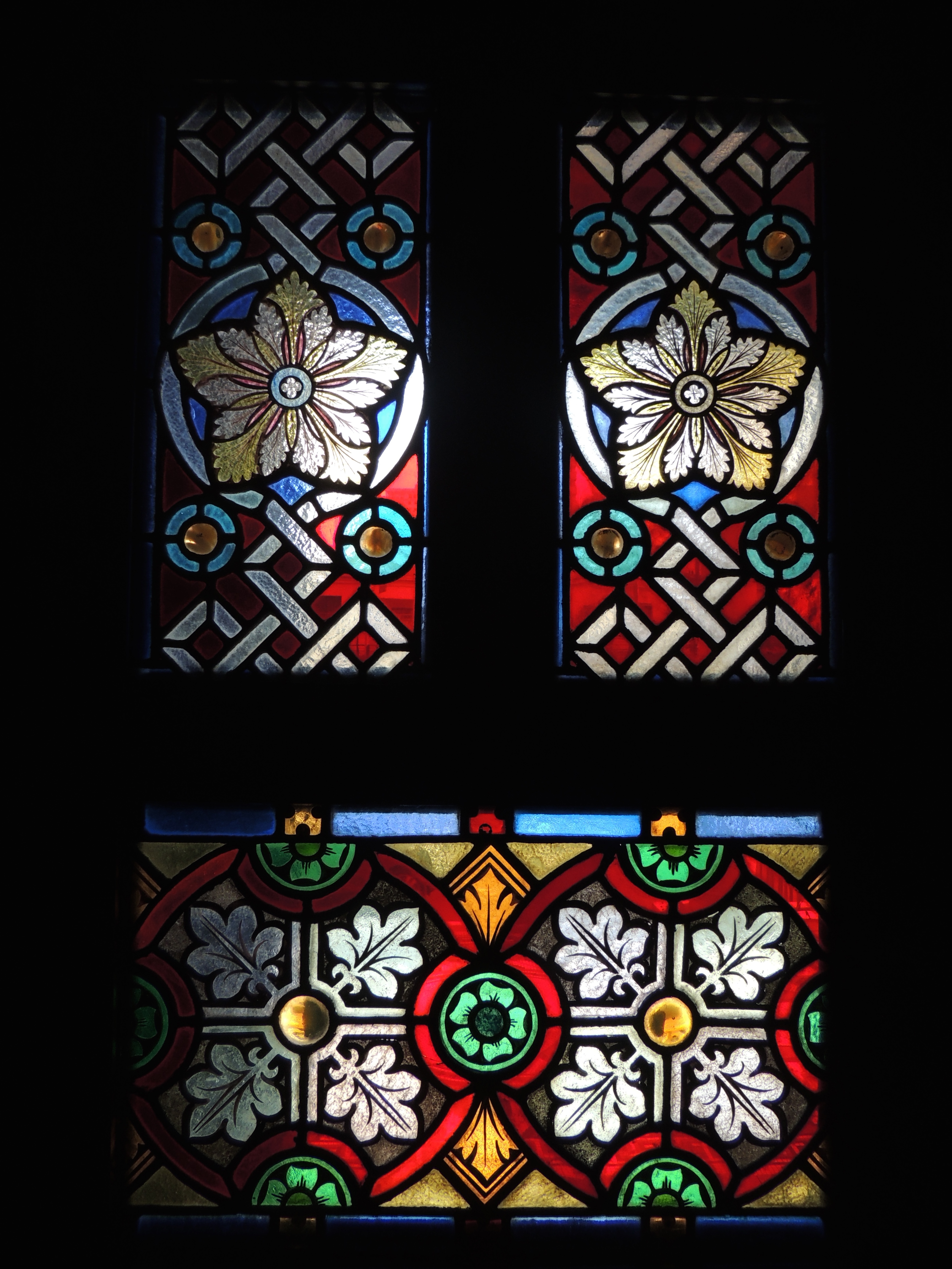 Vitral da porta da entrada da Paróquia de São Geraldo das Perdizes, em Perdizes, São Paulo, SP, Brasil.